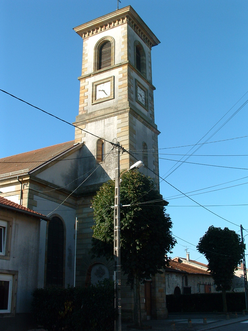 Eglise de Guessling-Hemering